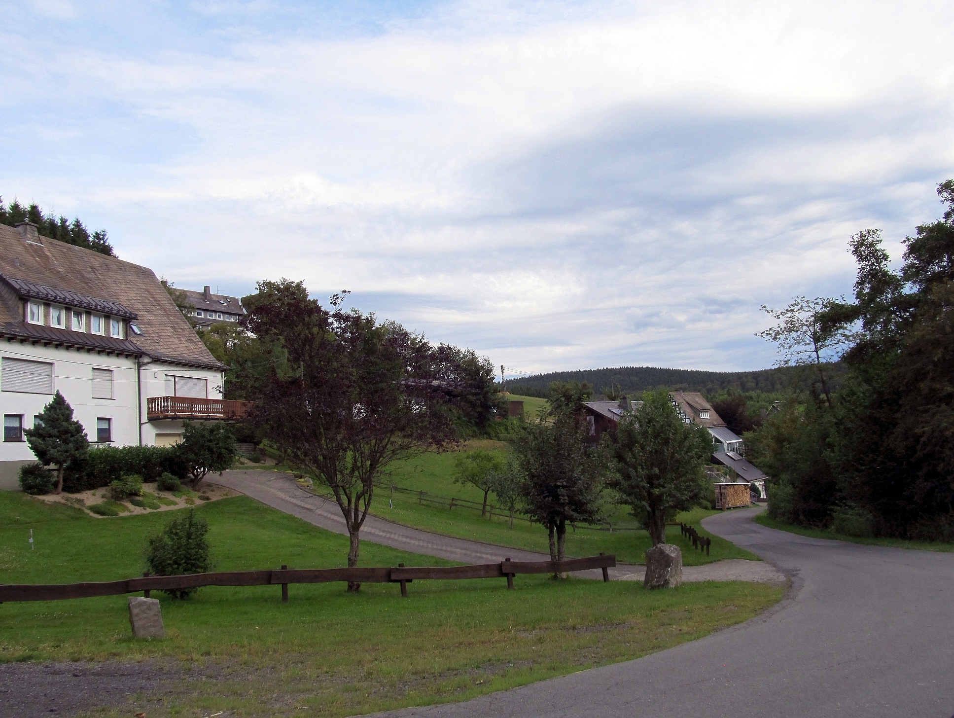 Schmallenberg-Nesselbach (Germany)